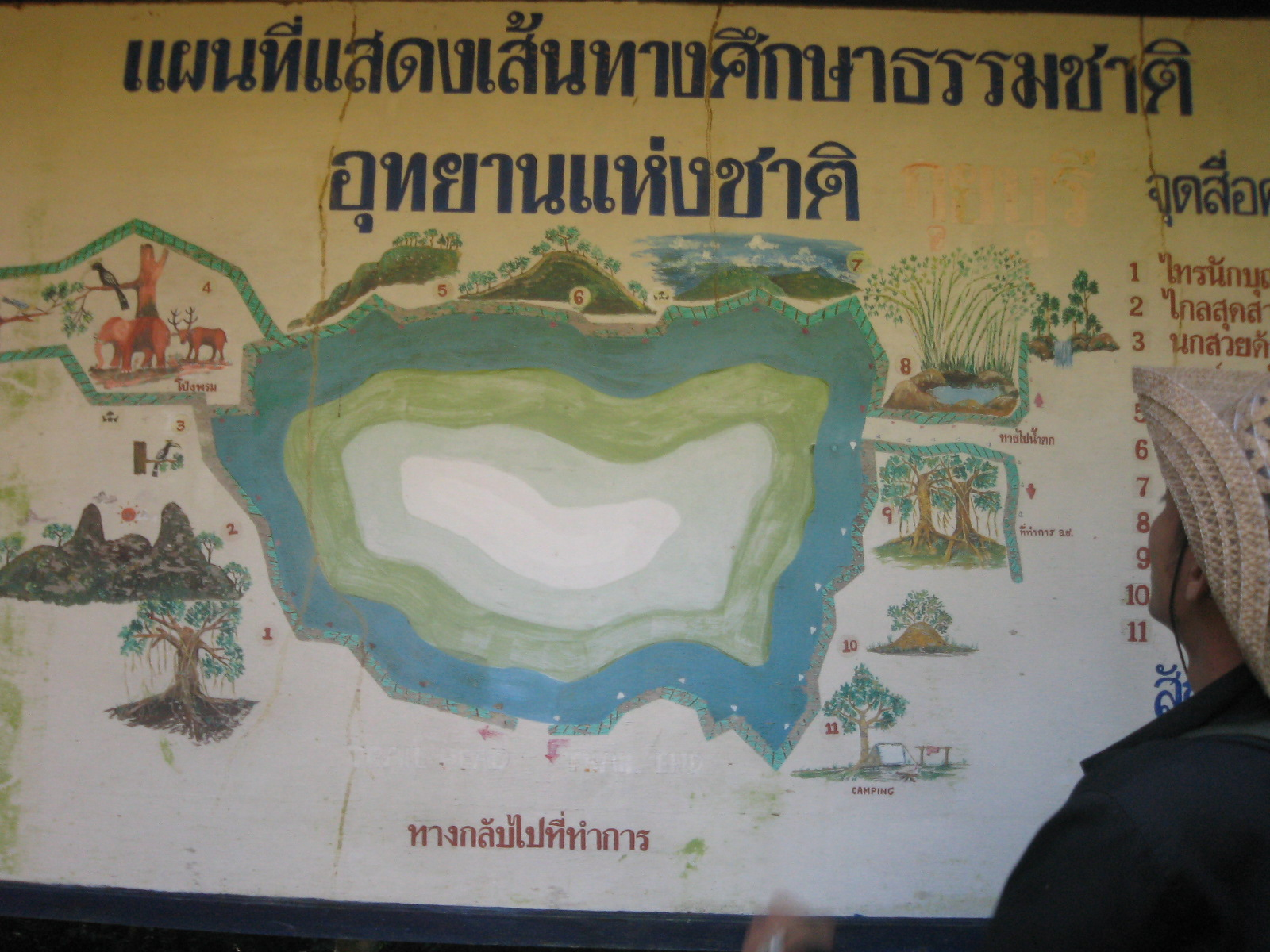 แผนที่อุทยานแห่งชาติกุยบุรี